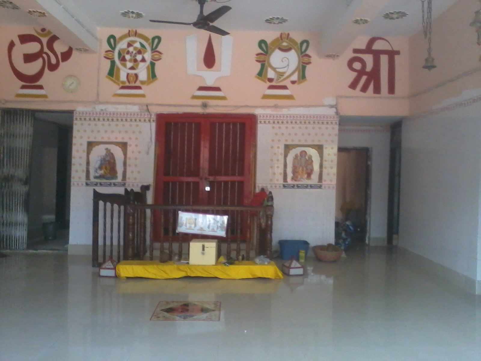 लक्ष्मीनारायण मंदिरको कपाट